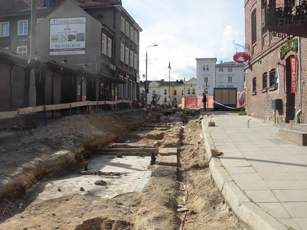 Fundamenty dawnej zabudowy na ulicy Krętej w Bydgoszczy